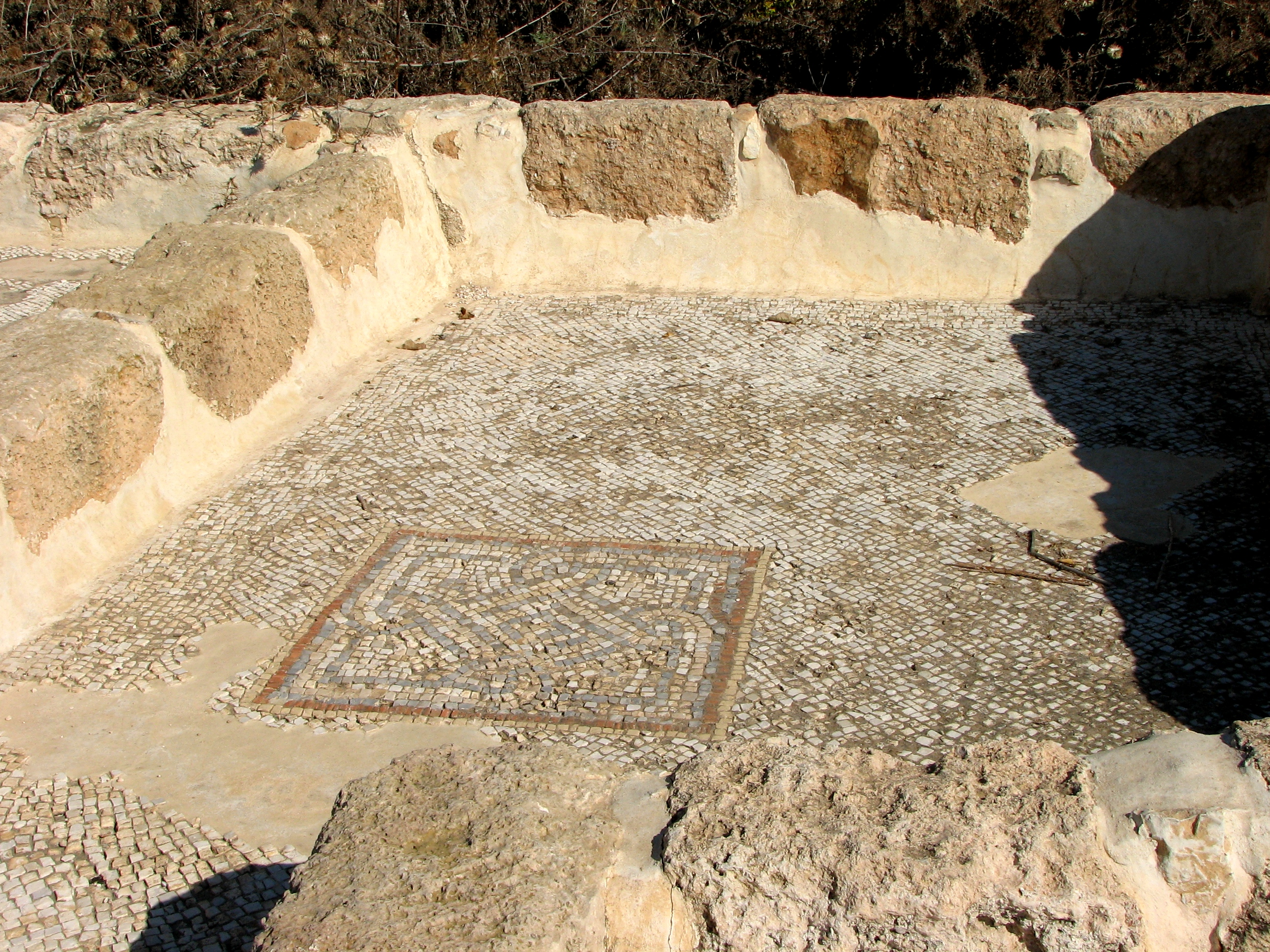 Hurbat Castra – Byzantine Period 4th-7th Centuries. Located at Haifa חורבת קסטרא, התקופה הביזנטית מאות 4-7 לספירה. החורבה נחפרה במבואותיה הדרומיים של חיפה, על התוואי המתוכנן של מנהרת הכרמל. באתר התגלתה עיר רומית ביזנטית שכלכלתה התבססה על ייצור יין ושמן זית בכמויות תעשייתיות שרידי מבנים שנשארו באתר רצפת פסיפס במבנה גדול